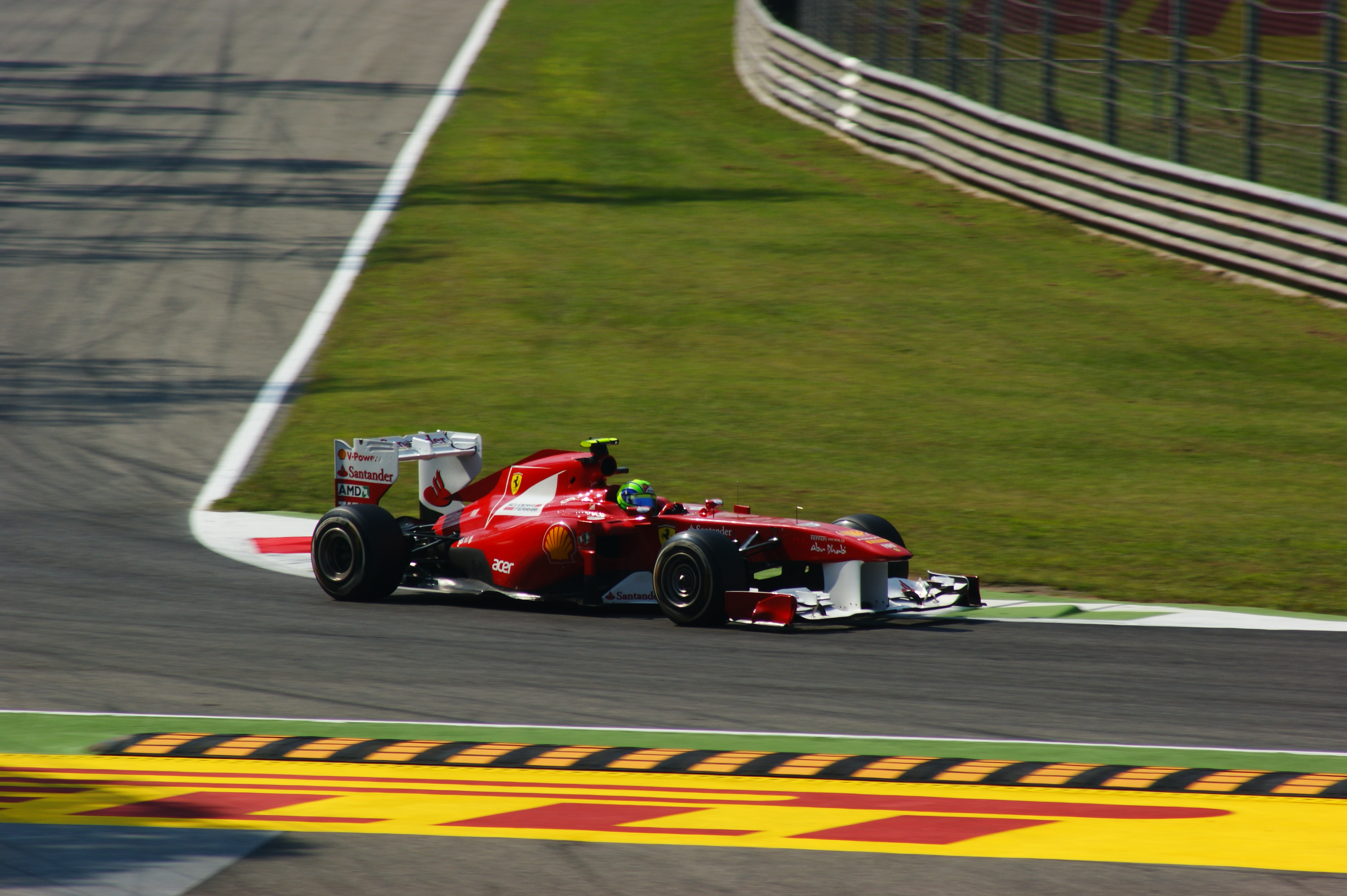 Felipe Massa alla variante della roggia Monza 2011